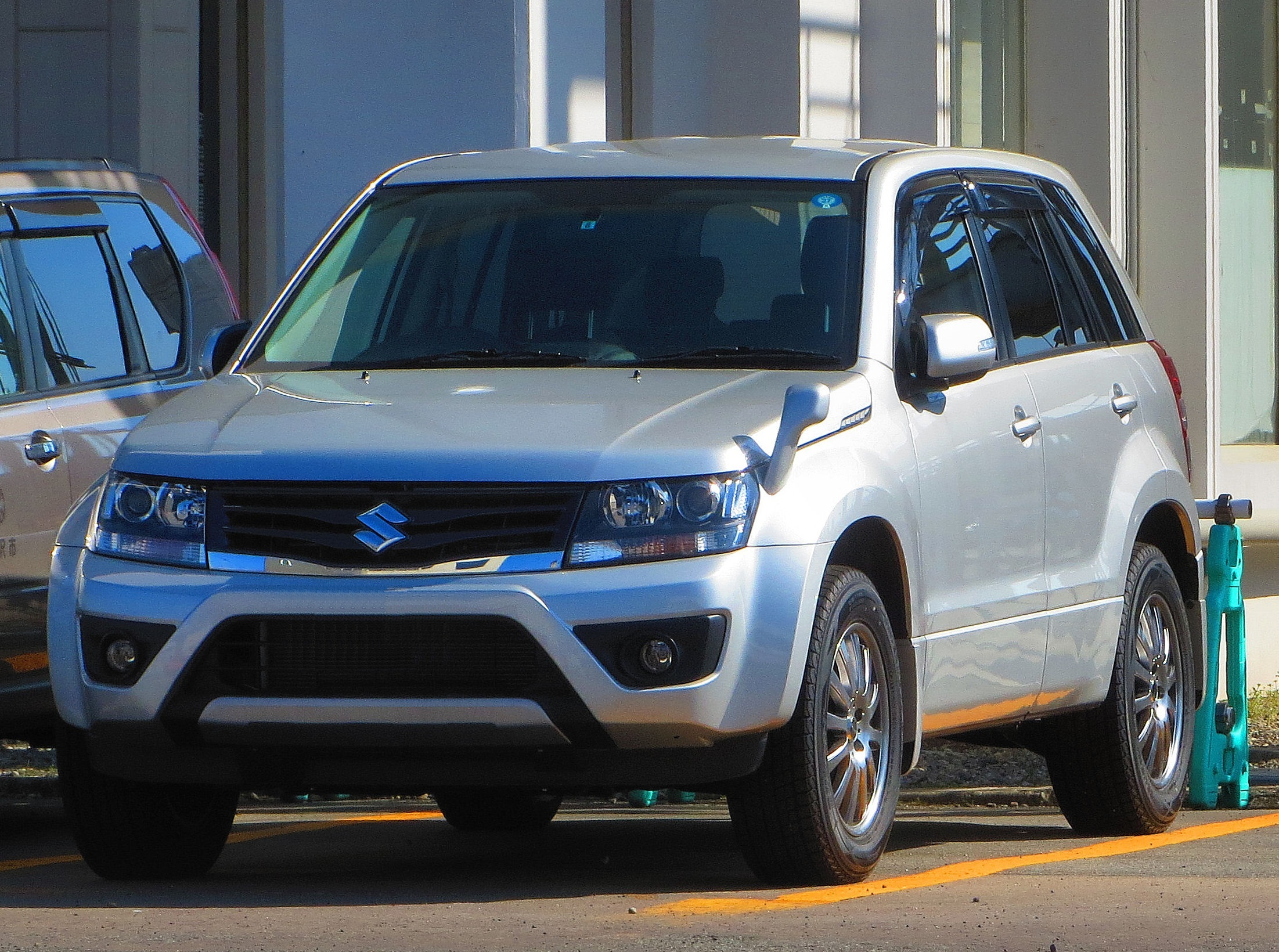 スズキ エスクード XG 7型